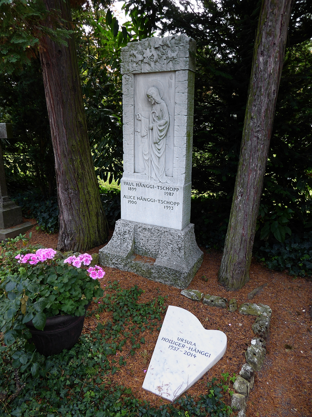 Ursula Holliger-Hänggi (1937–2014), Harfenistin, Solistin und Kammermusikerin